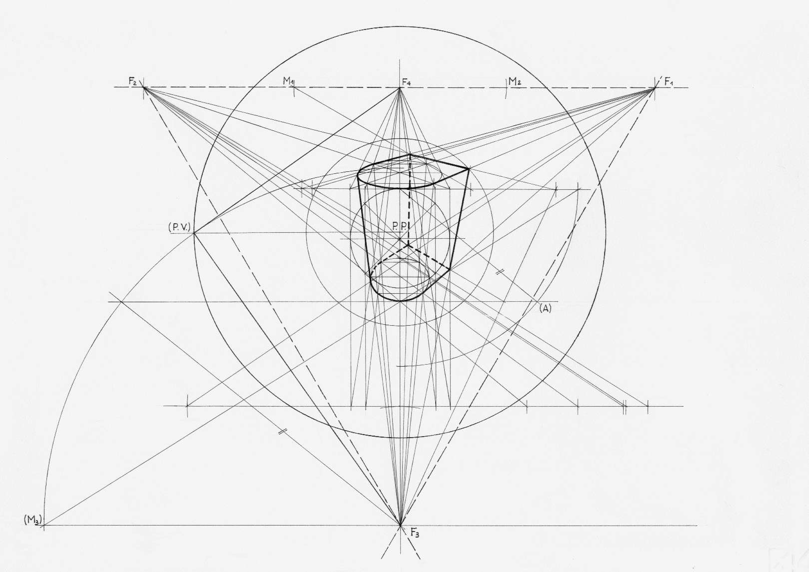 Prospettiva a quadro obliquo dall'alto di un solido. Il file è stato creato scandendo il disegno con uno scanner.